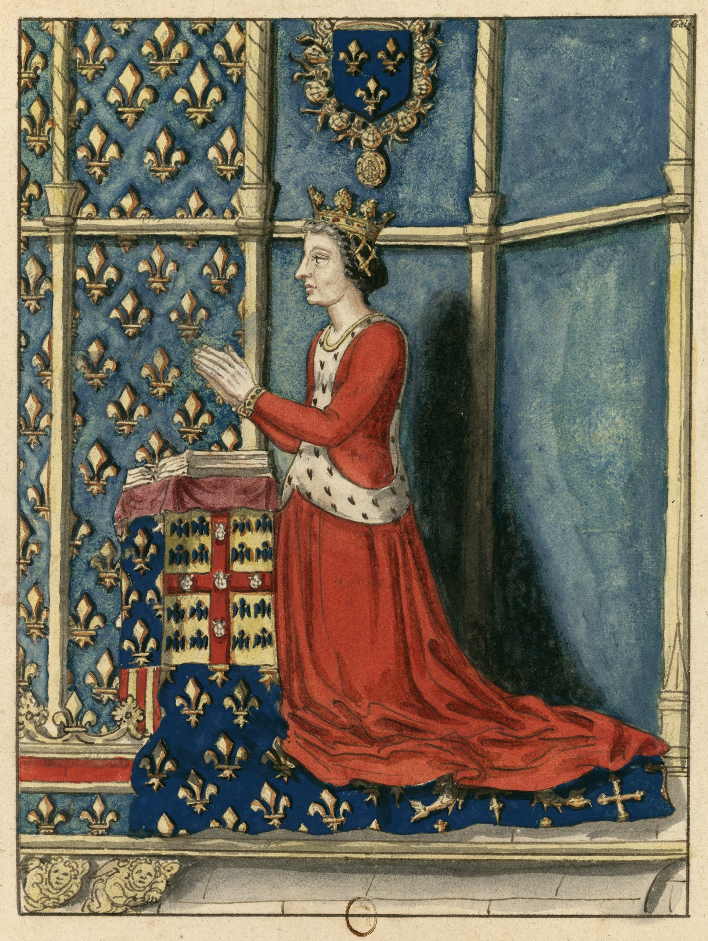 Jeanne de Laval (1498)